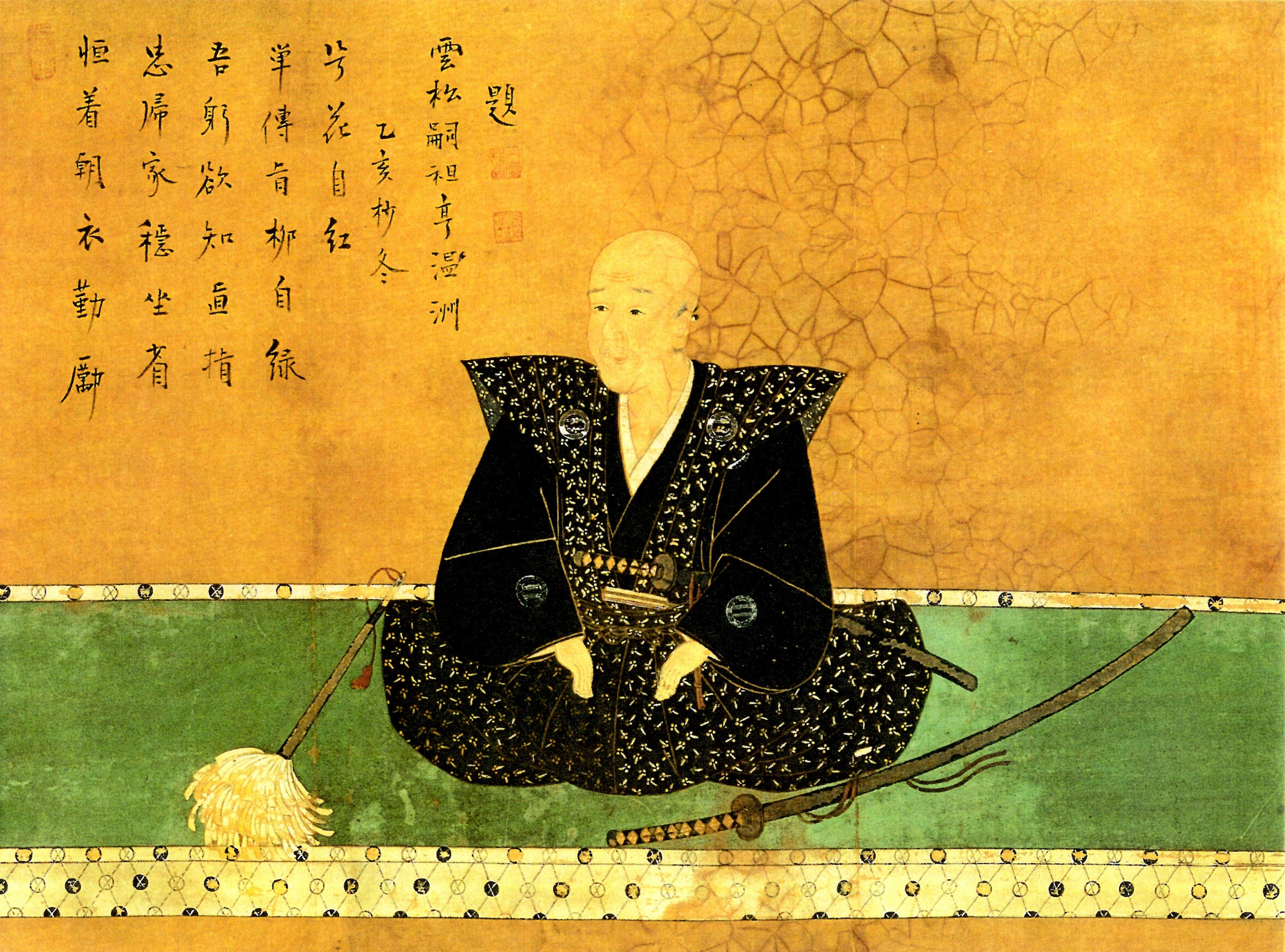 松浦鎮信の肖像。